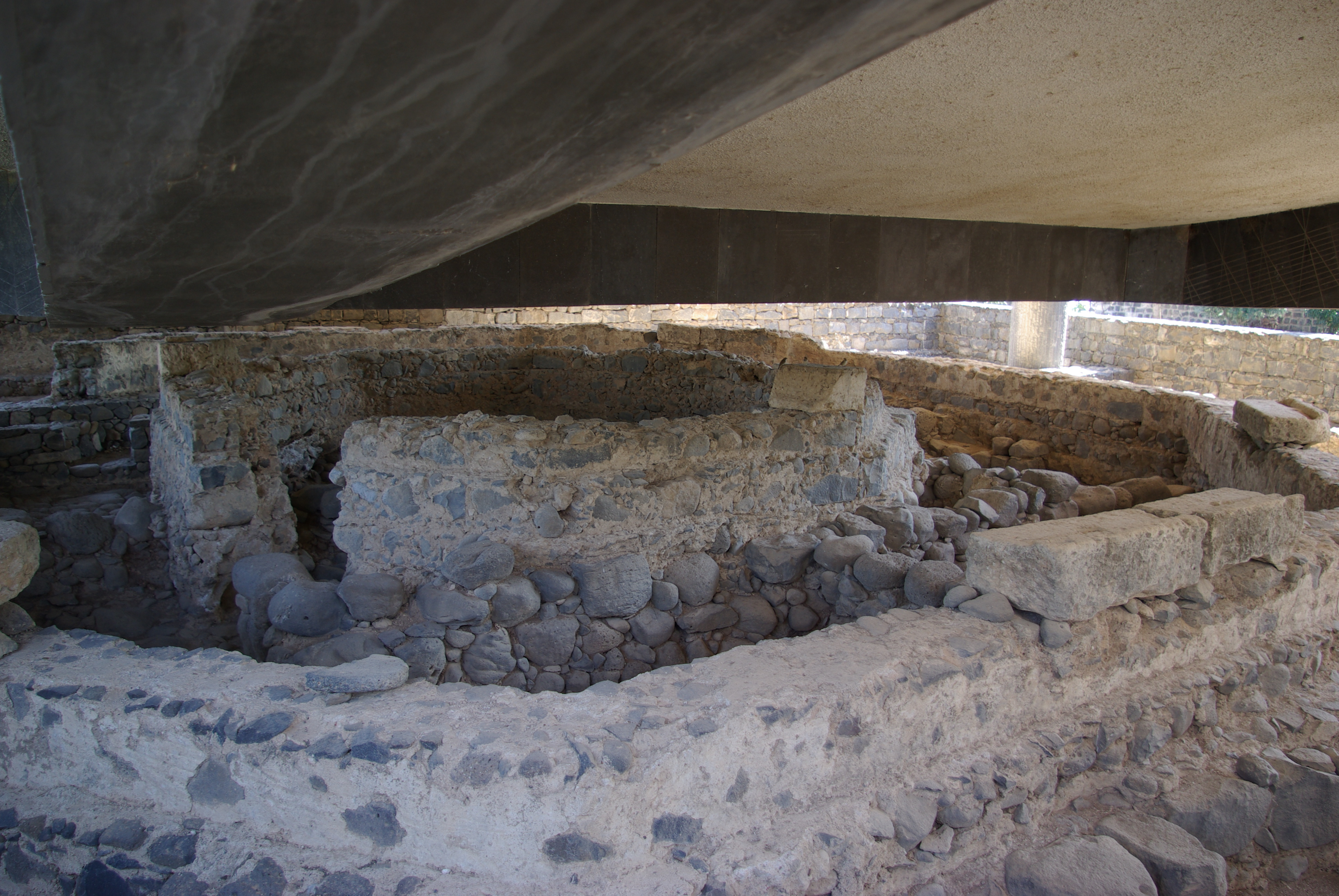 Haus des Petrus